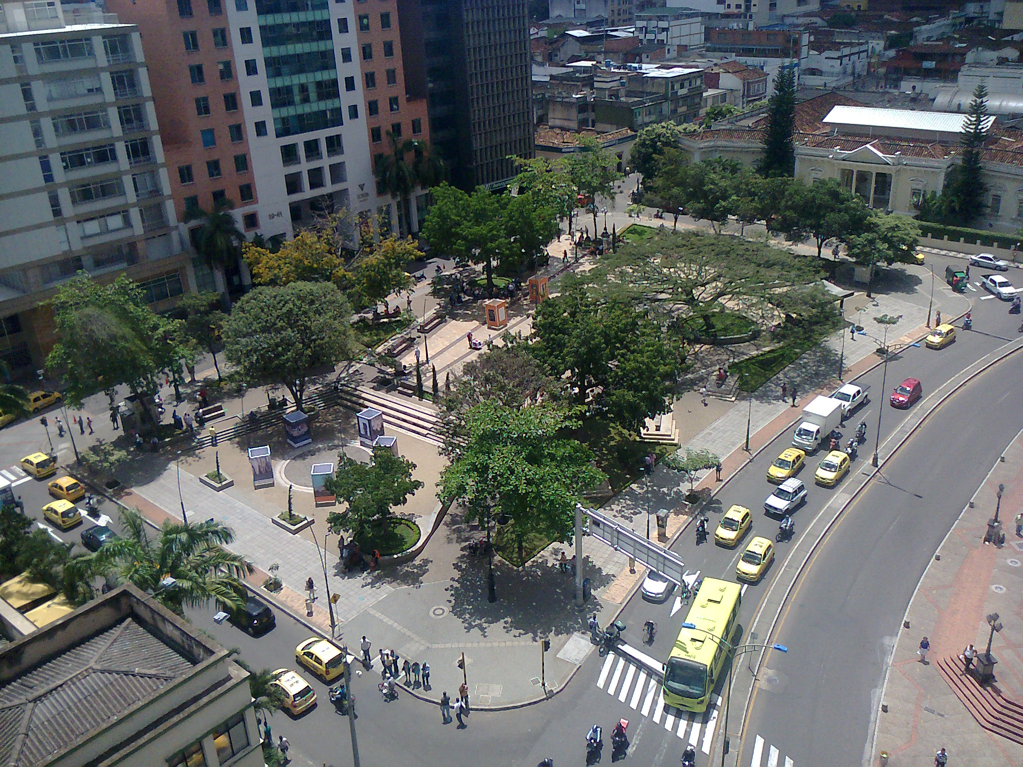 Parque Santander, ubicado en la zona centro de Bucaramanga. Vista del parque desde la Cámara de Comercio de Bucaramanga.